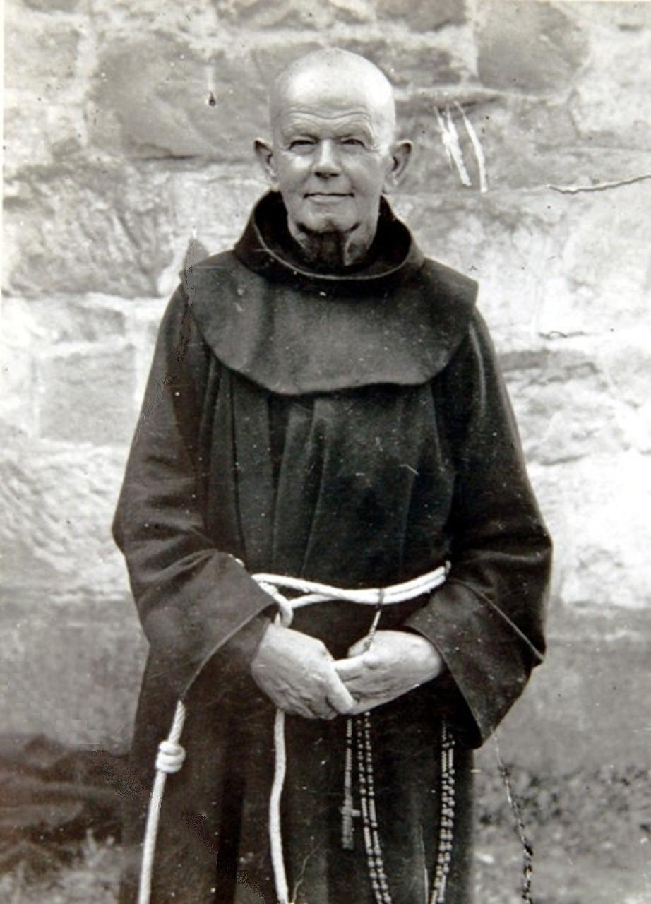 Zdjęcie br. Alojzego Kosiby OFM